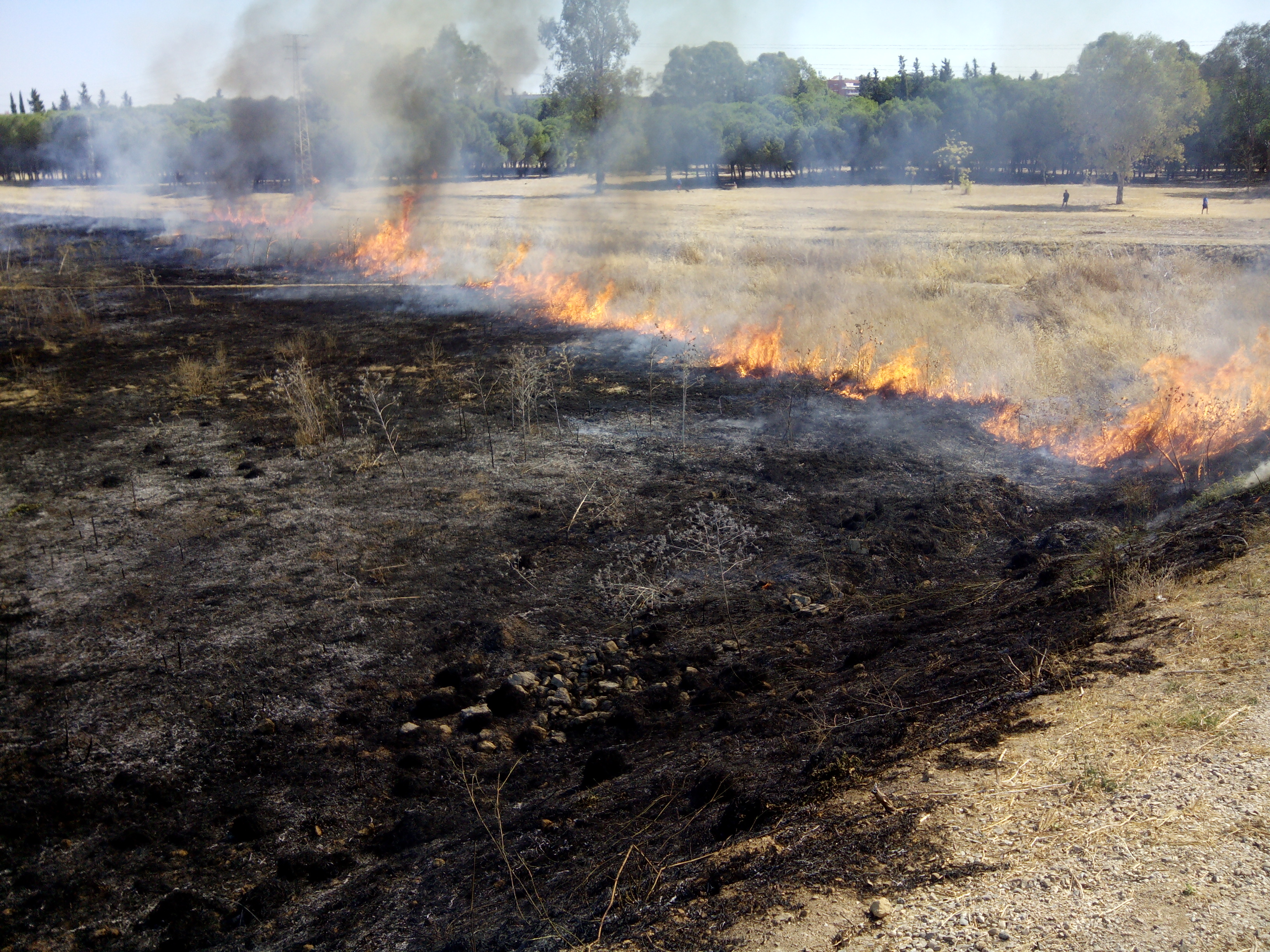 Pequeño incendio en una parcela junto al canal de Sevilla Este. Agosto de 2014.